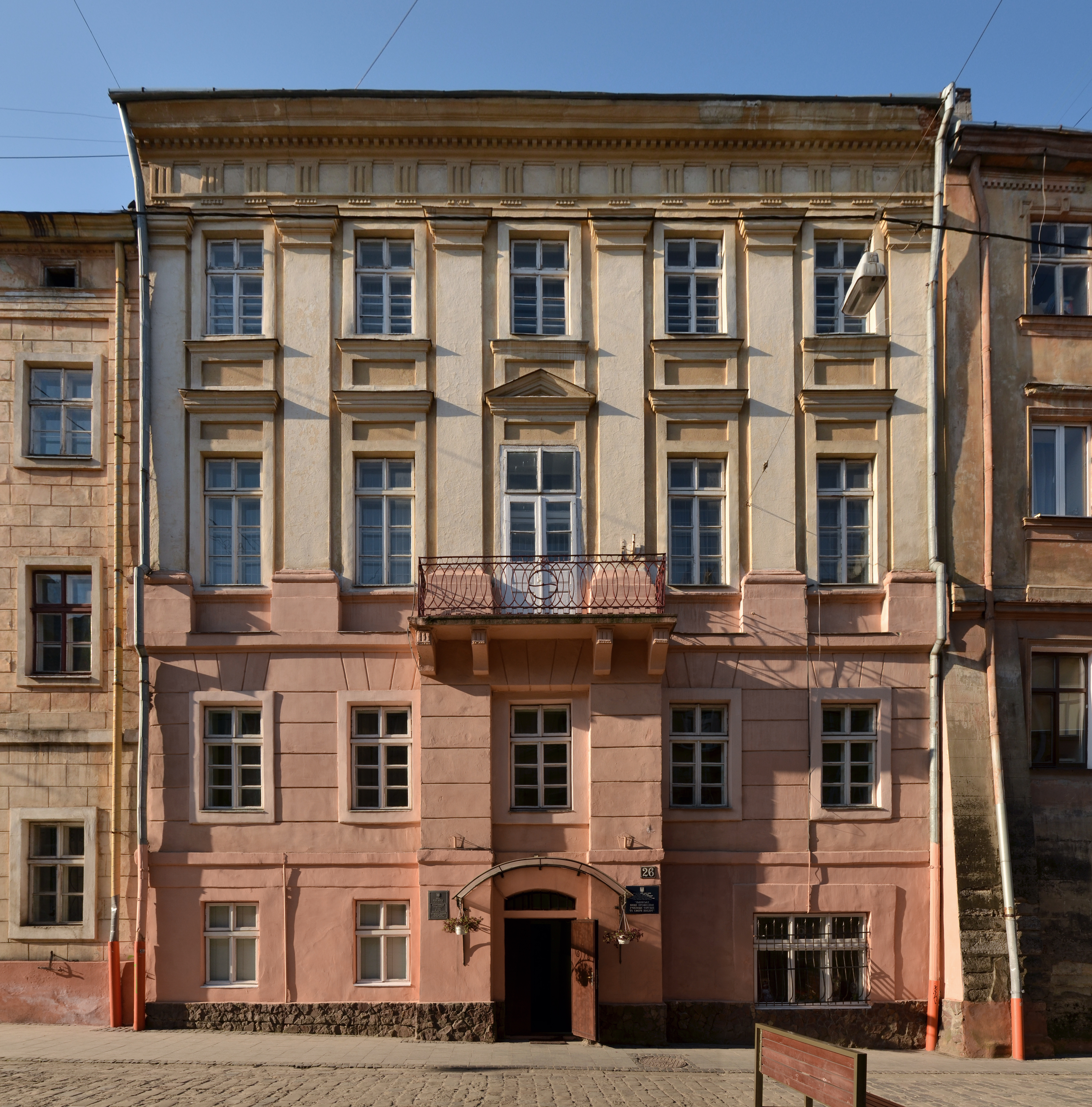 Будинок № 26 на вулиці Лесі Українки у Львові.